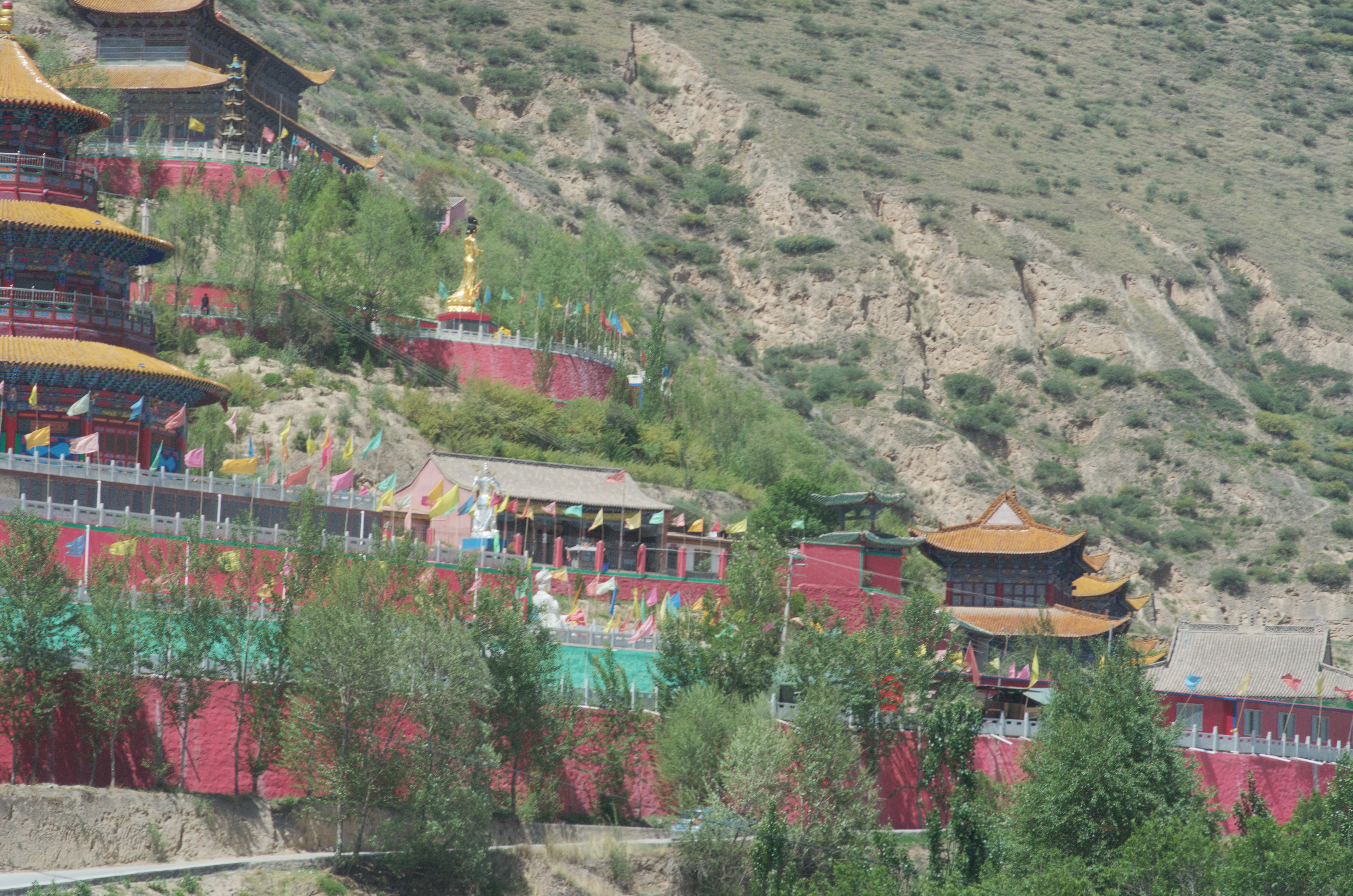 Temple taoïste on l'honneur de Jiutian Xuannü (九天玄女) sur le Mont Fenghuang (凤凰山), dans le village de Lunmalong (扎麻隆村), bourg de Duoba, province de Qinghai, Chine.